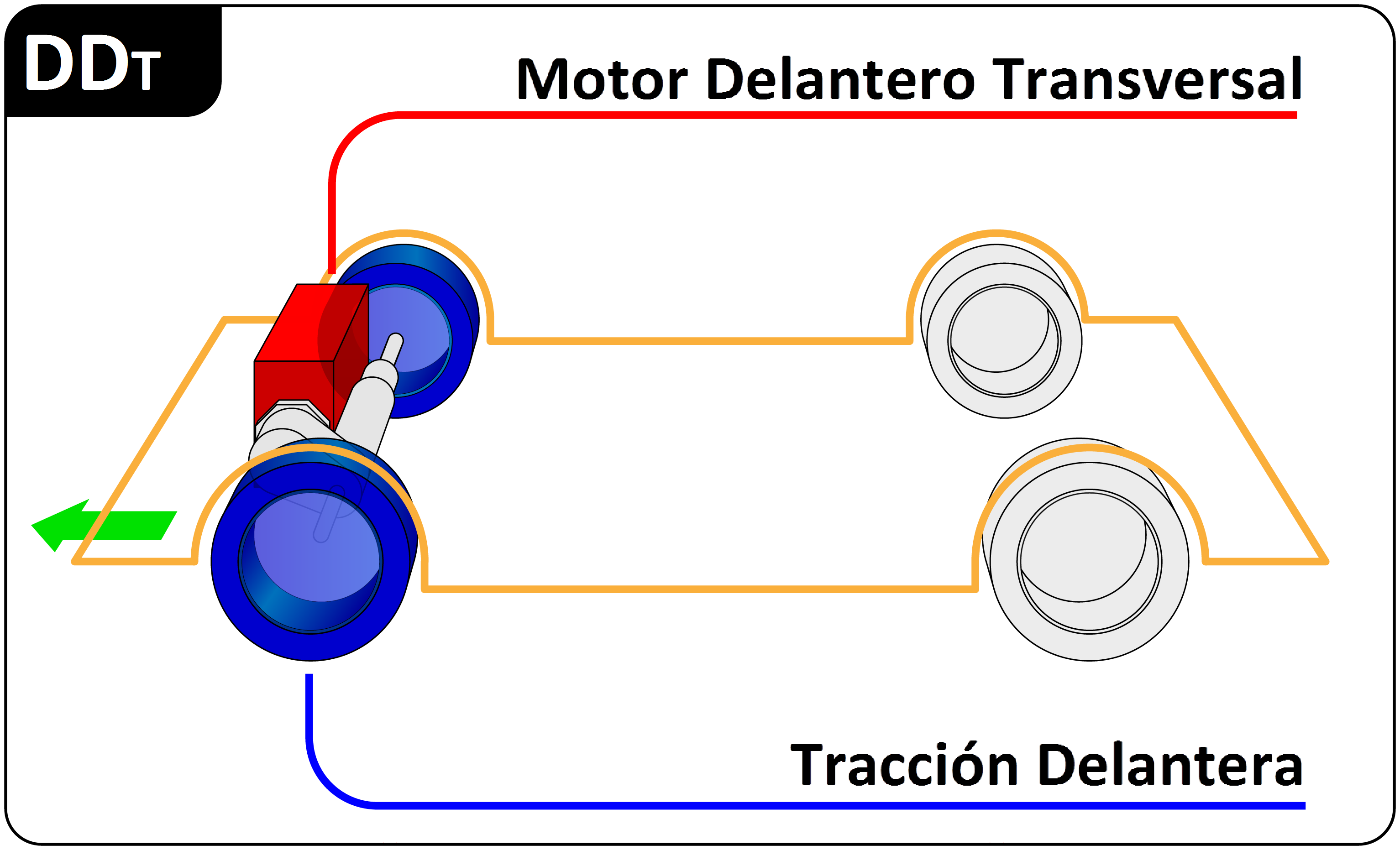 Diagrama de un vehículo con motor delantero y tracción delantera, con motor transversal (DDT)